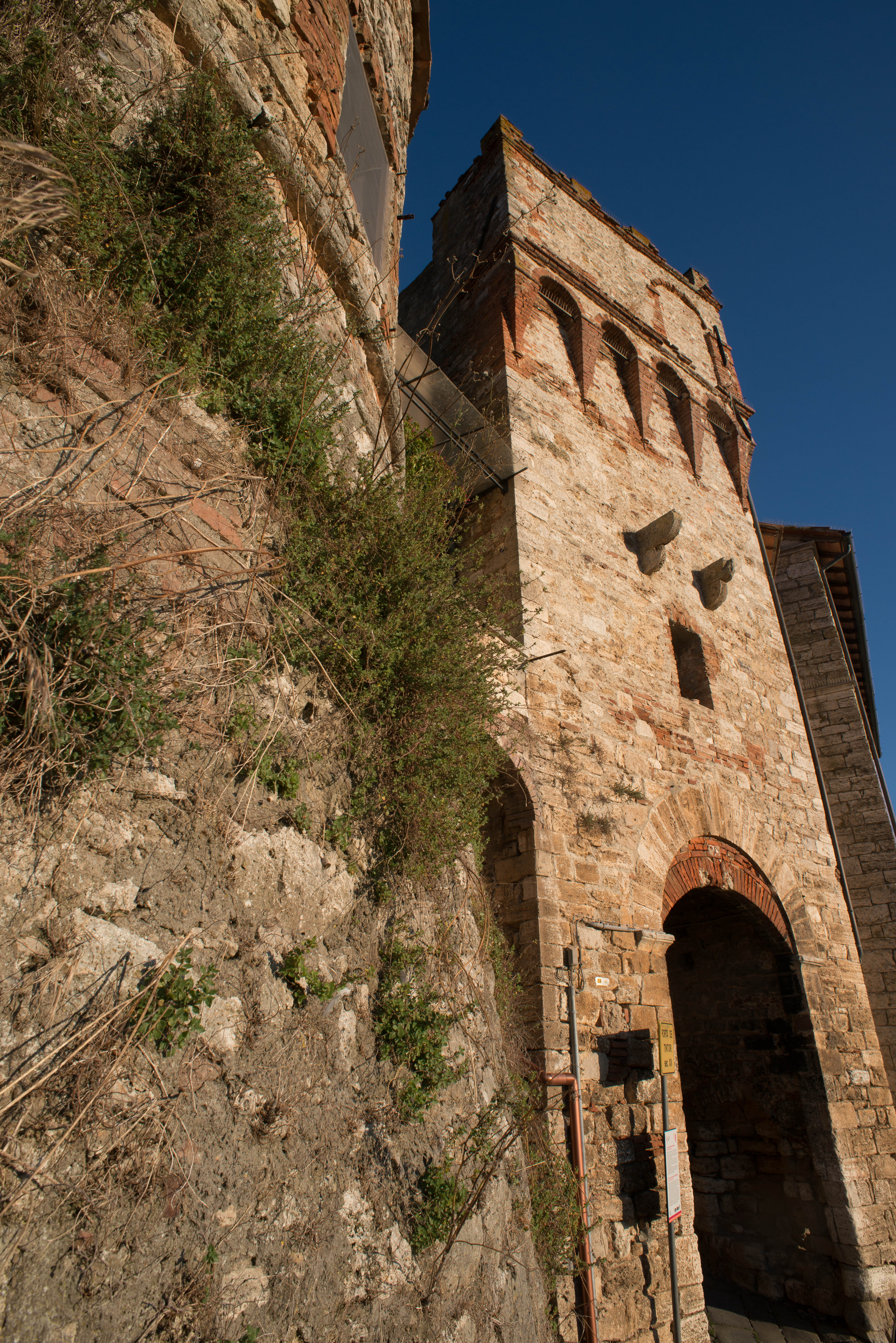 Porta dei Tintori This is a photo of a monument which is part of cultural heritage of Italy.